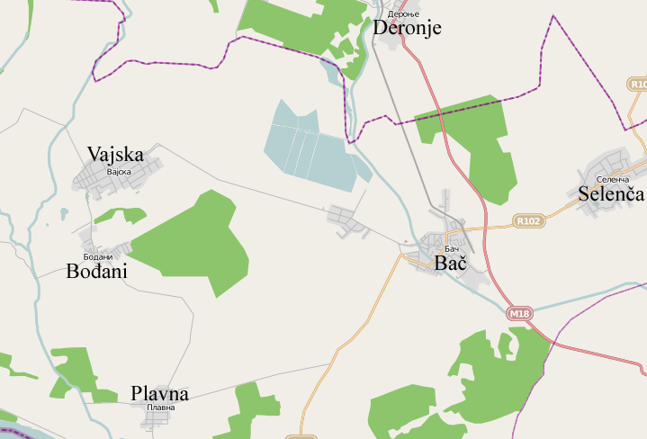 Mapa Bača i okolnih naselja.